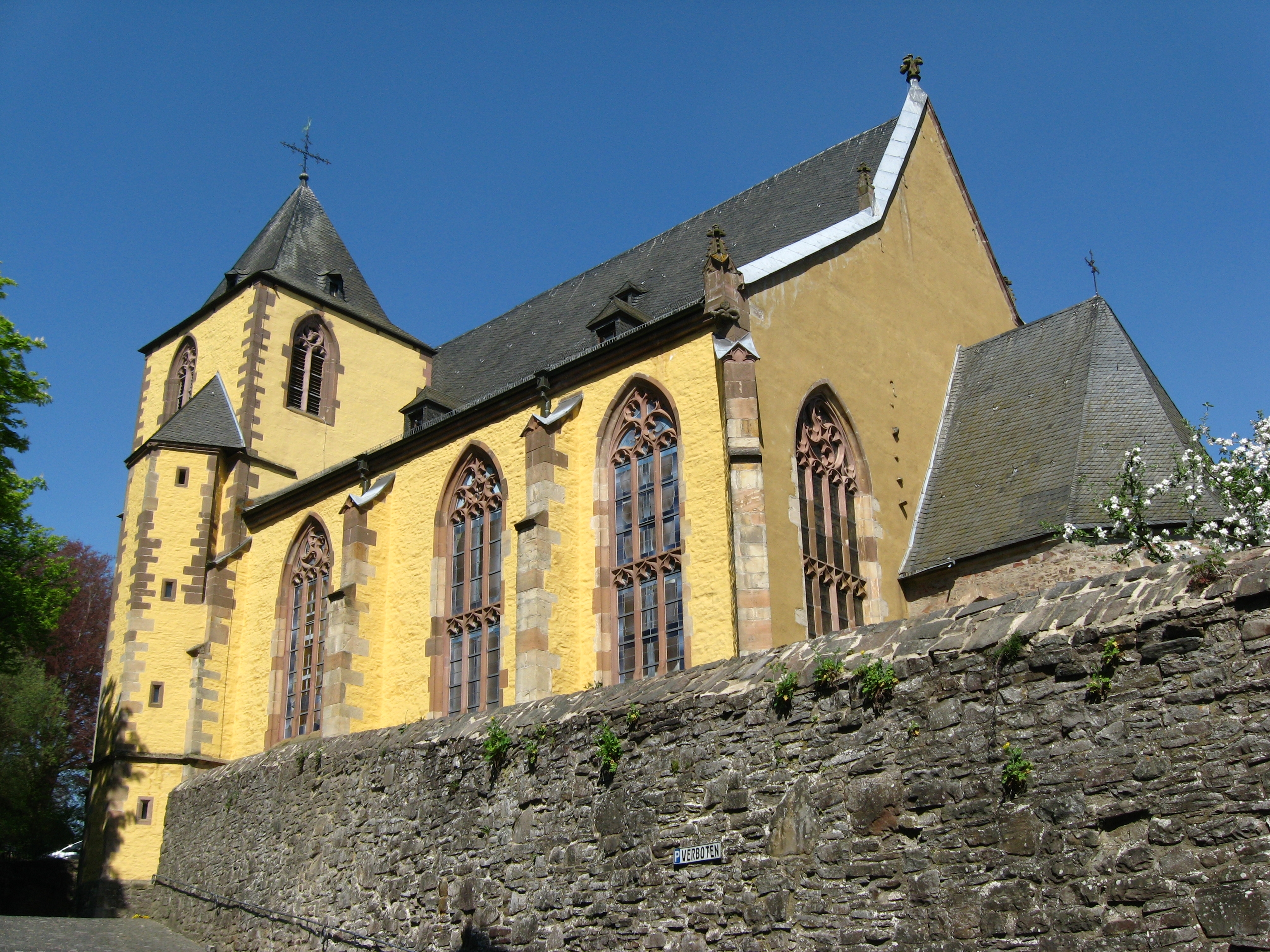 Schleiden, Schlosskirche Datum: 25.04.2011 Urheber: M. Pfeiffer alias Benutzer:Gordito1869 Quelle: privates Fotoarchiv des Urhebers